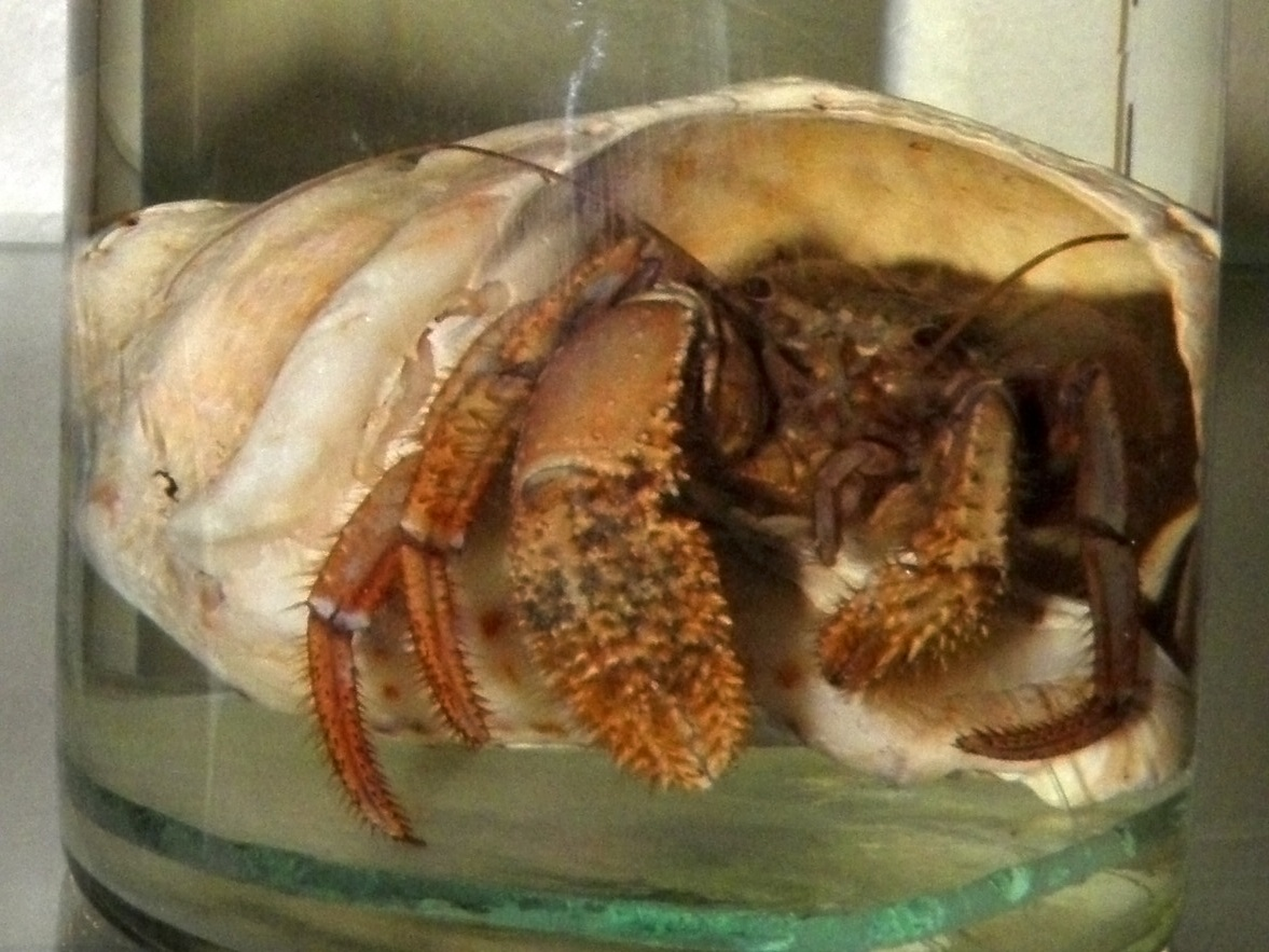 Pagurus pectinatus в Научном музее ДВФУ (г. Владивосток)